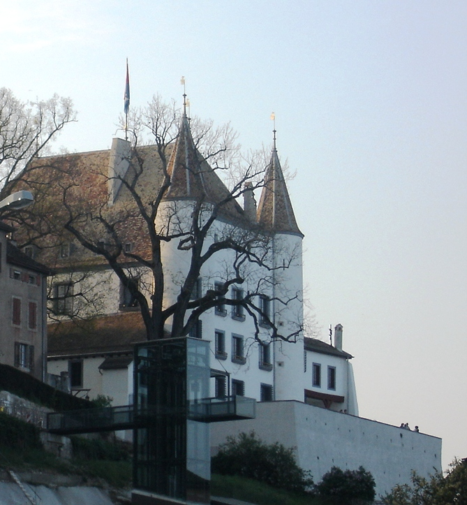 Castle in Nyon, Switzerland